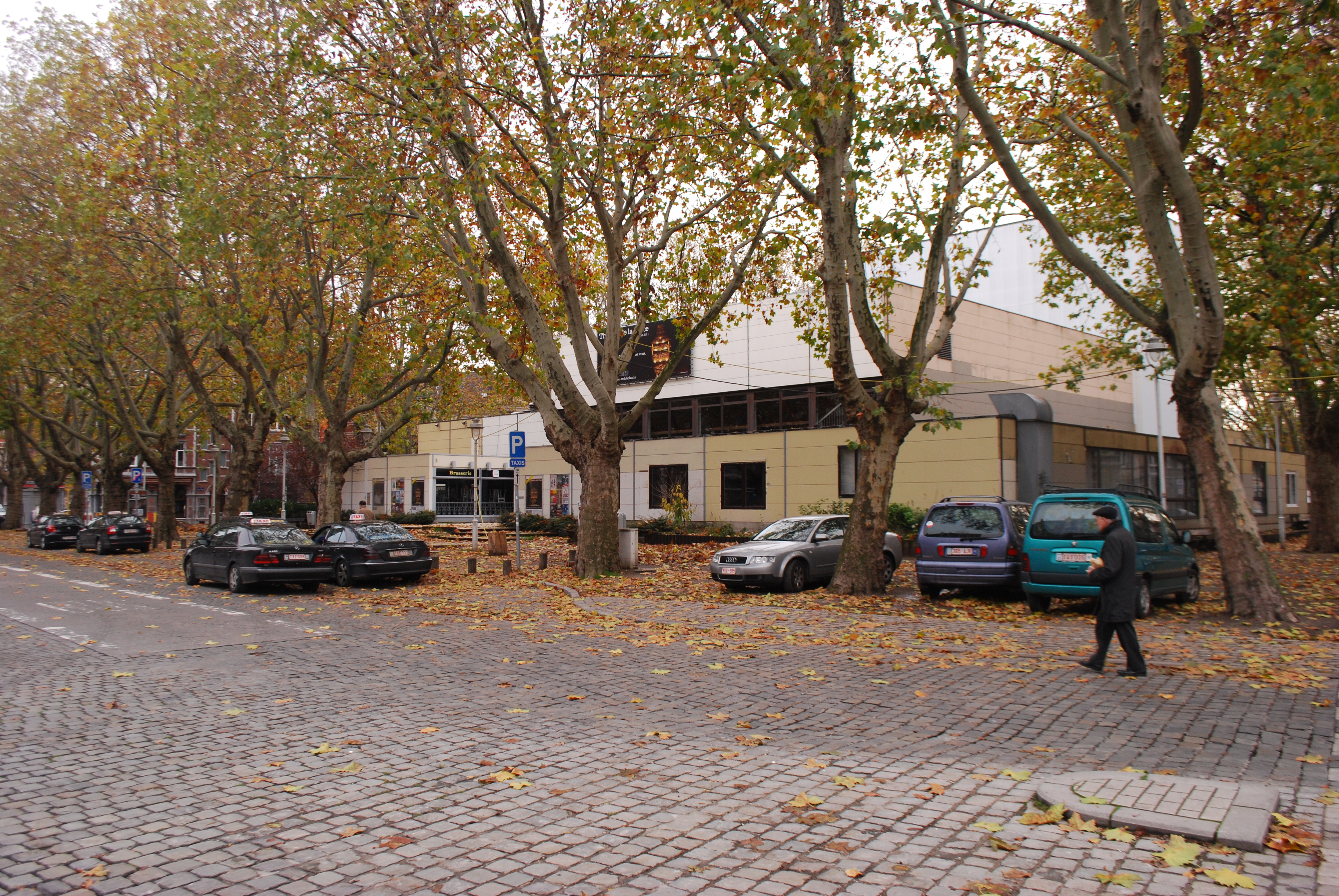 Le "Théâtre de la Place" sur la place de l'Yser, dans le quartier d'Outremeuse à Liège.